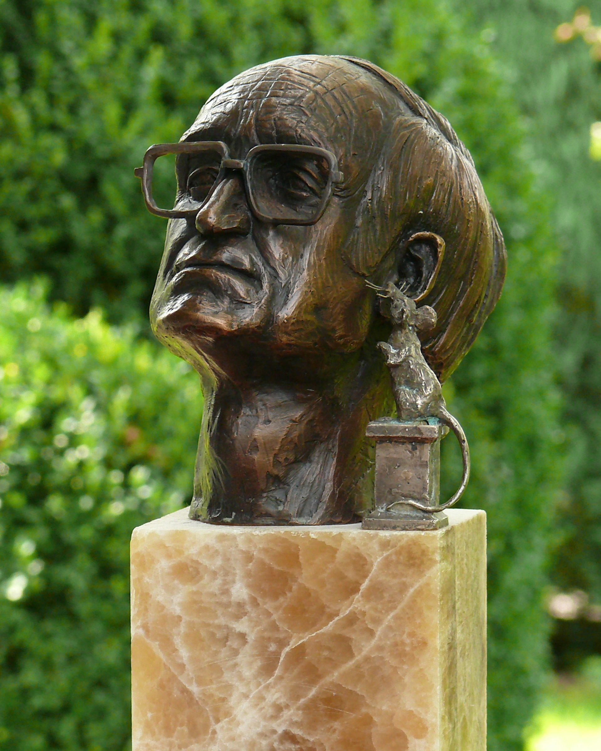 Skulptur (Bronze) von Josef Guggenmos (1922-2003) in Irsee.